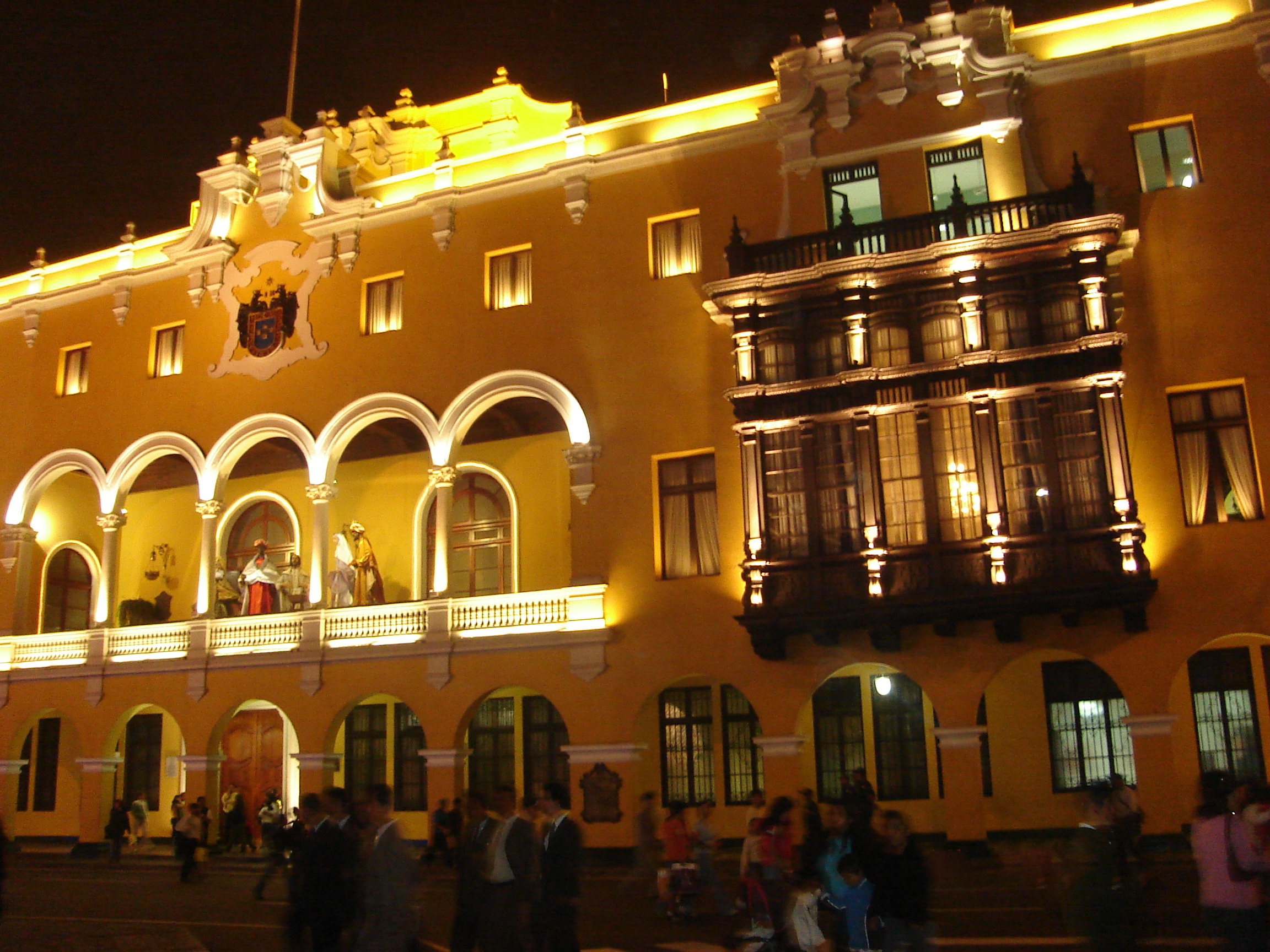 Mucipalidad de Lima